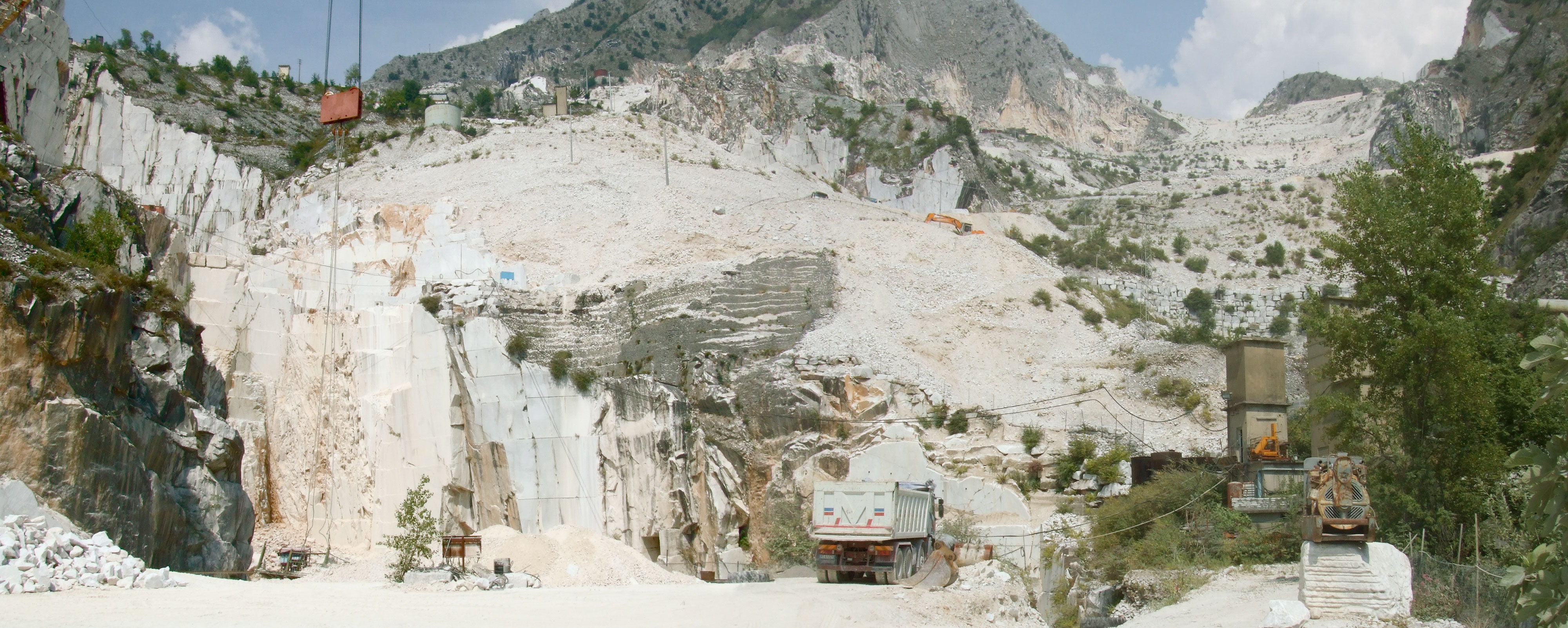 Panoramique du chantier d'une carrière de marbre de Carrare à ciel ouvert